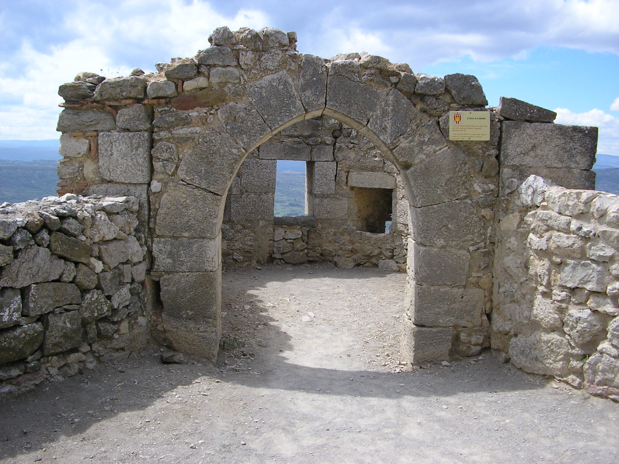 Torre de la Pardala al Castell de Morella, Morella, España.